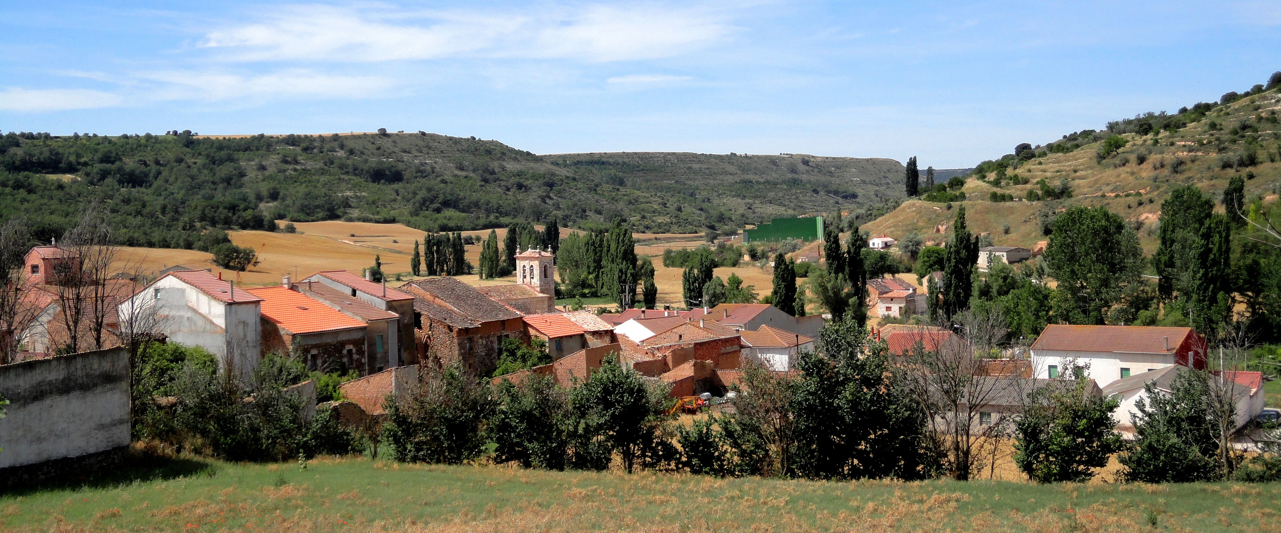 Valdearcos de la Vega. Iglesia y Frontón . Valle del Cuco. Valladolid